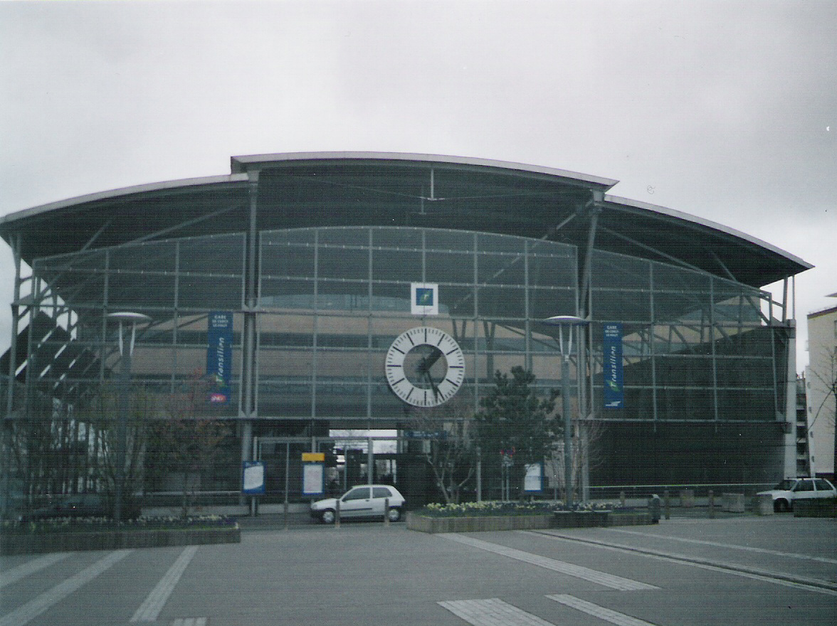 Façade de la gare de Cergy-le-Haut. Catégorie:Gare du Val-d'Oise